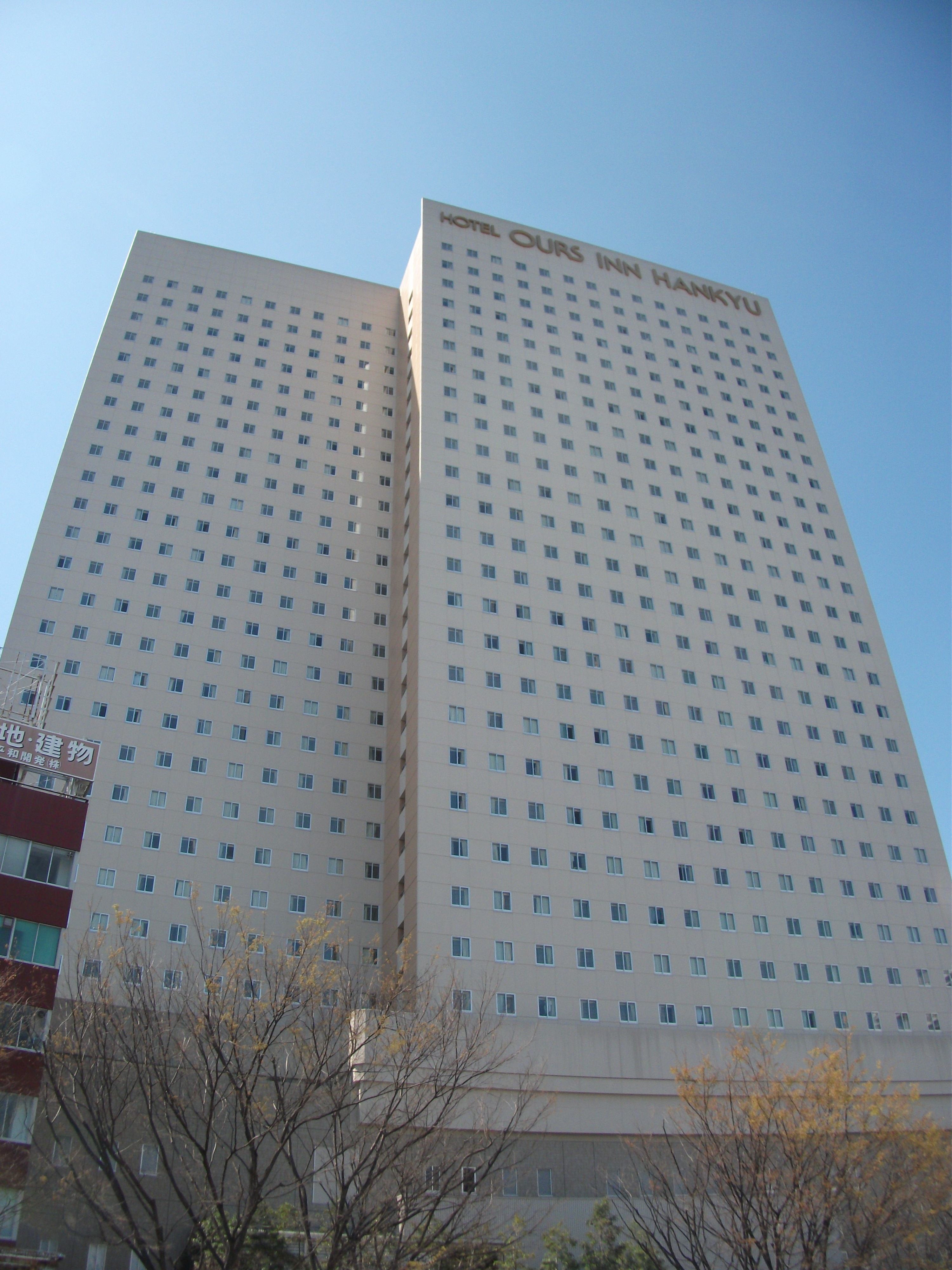 アワーズイン阪急